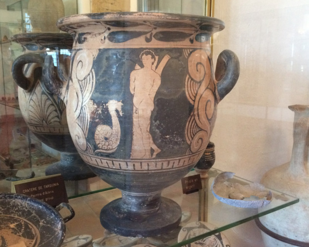 Corsu: Rapresentazione di Pirituu (Pirithoos), prigiuneru di l'infernu. Vasu etruscu à fiure rosse, museu d'Aleria